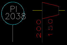 eigen werk, vrij van rechten